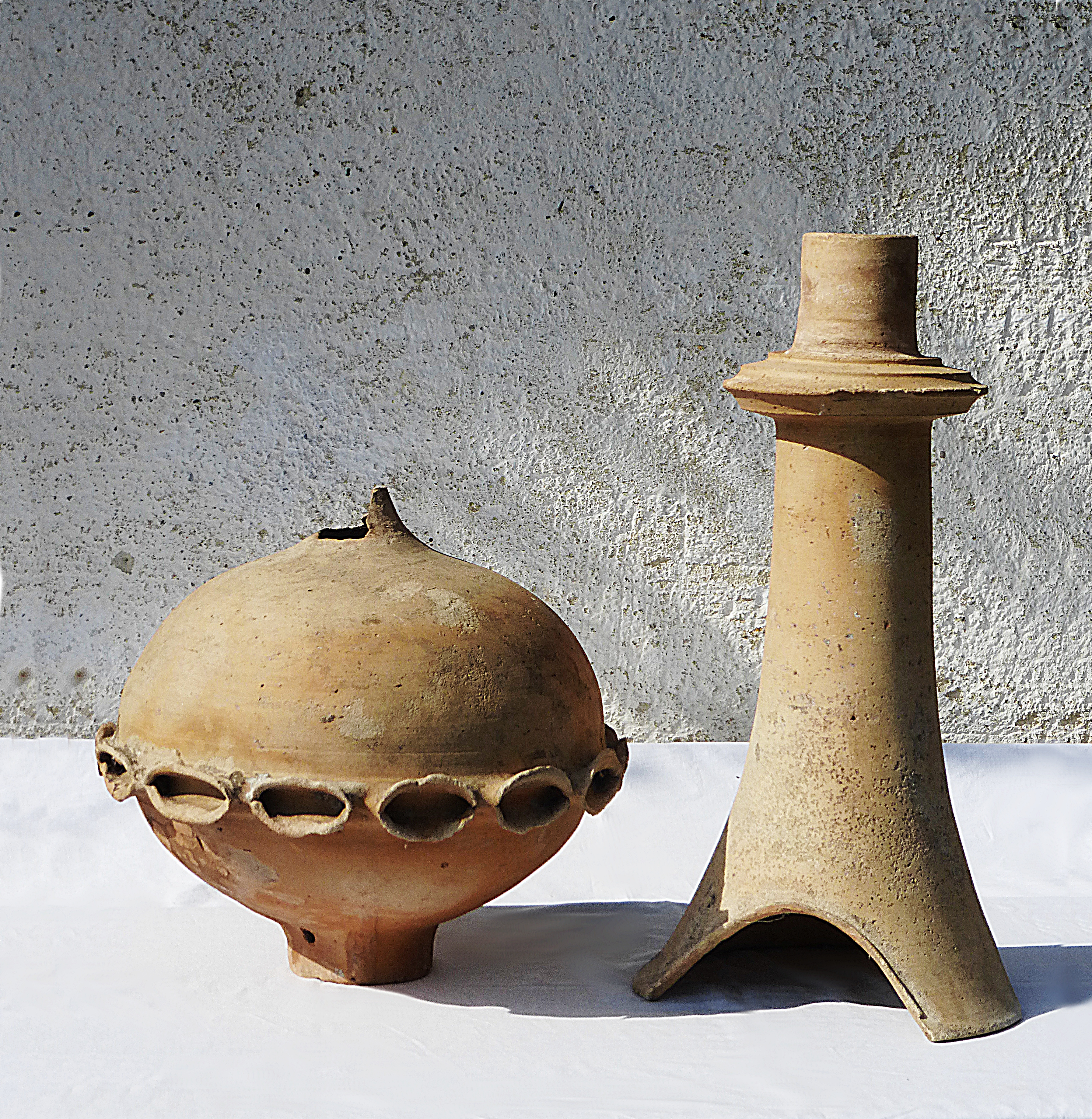 Turmaufsatz auf einer kleinen Kirche in Niederbayern / Rottal